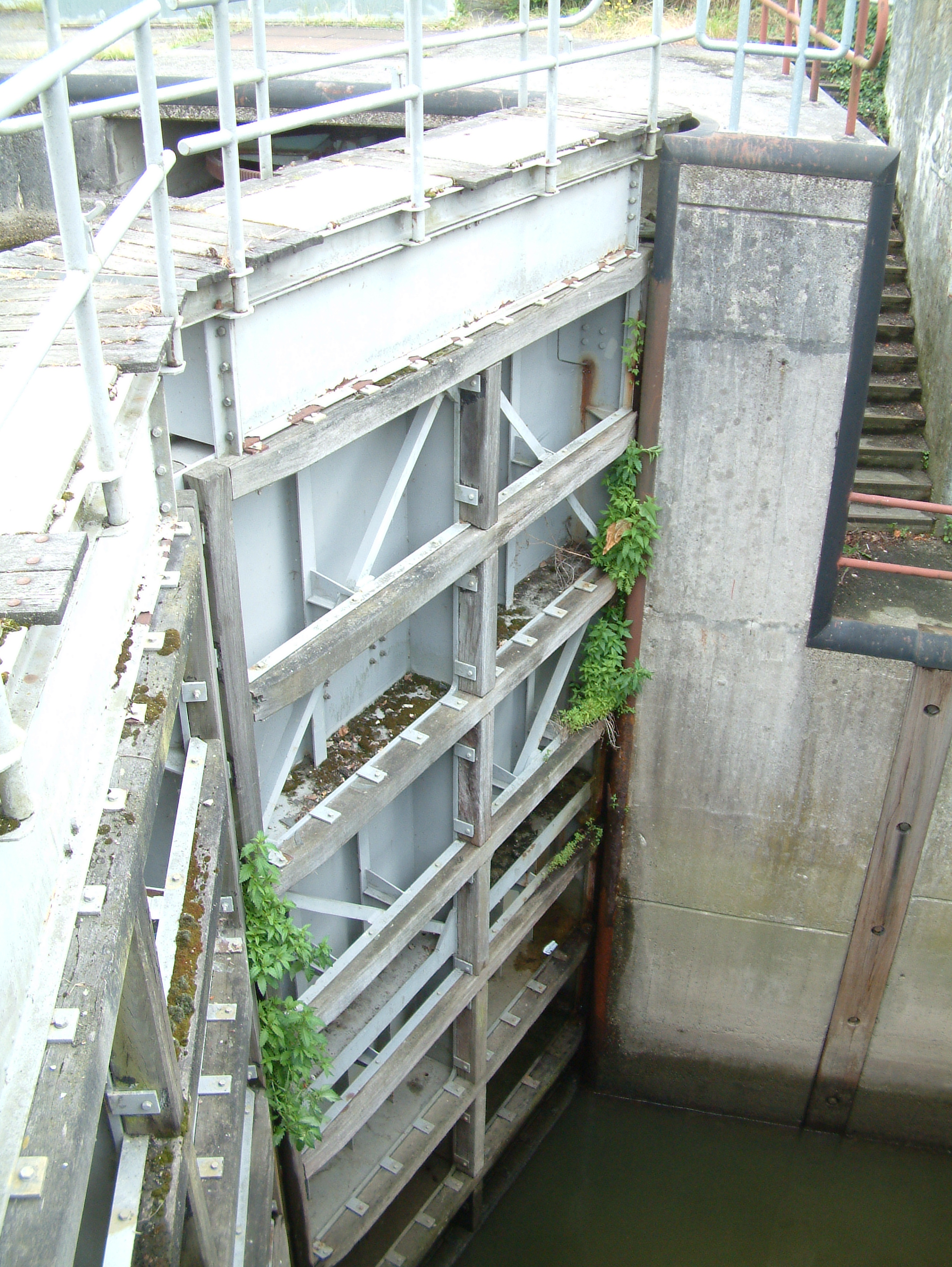 Sluis in het Apeldoorns kanaal van Dieren naar Hattem